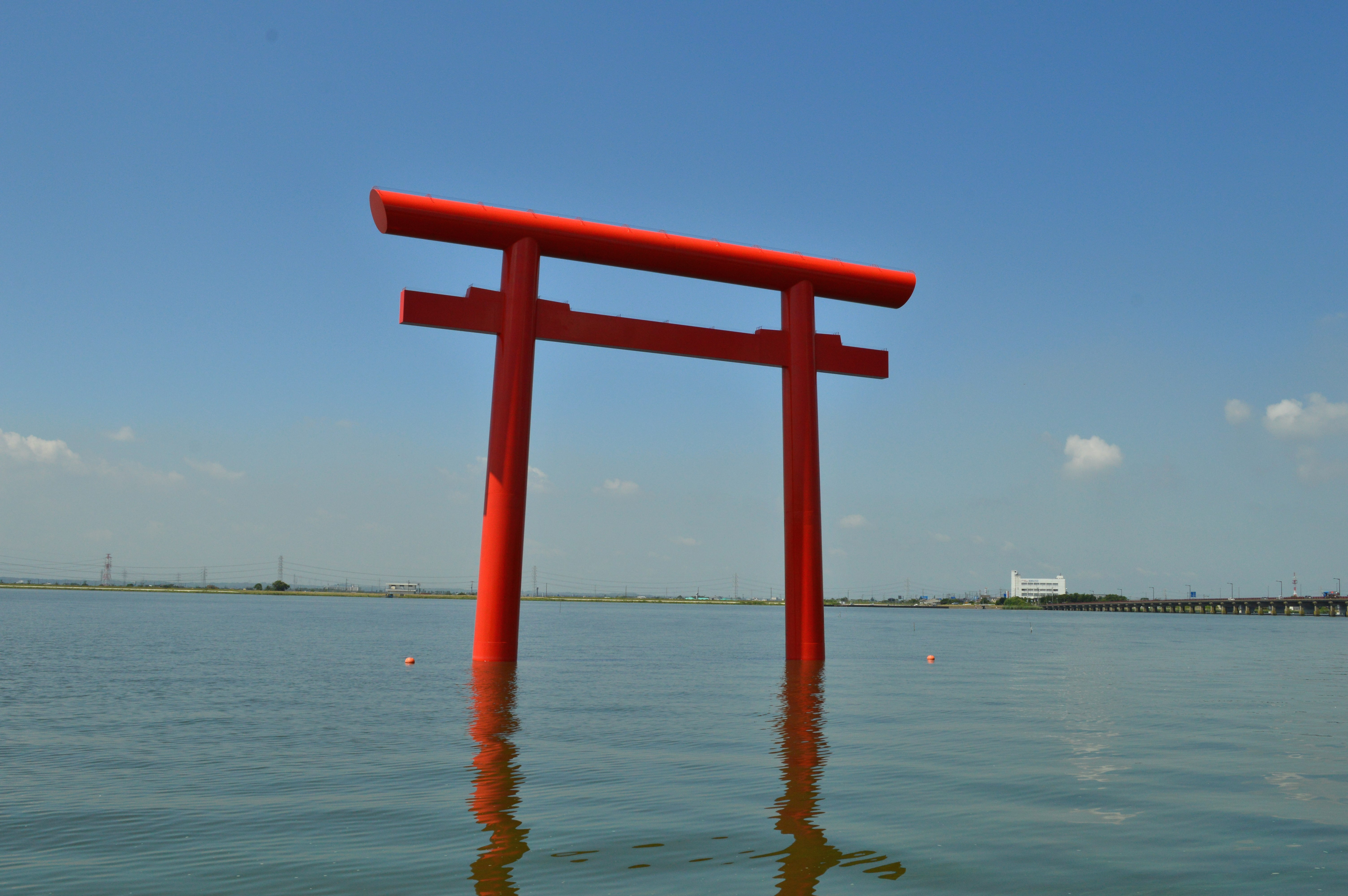 鹿島神宮 一の鳥居